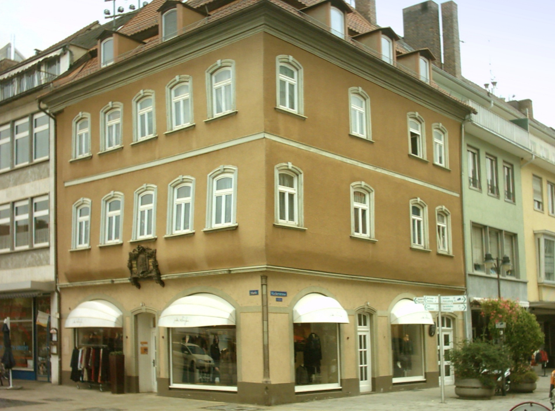 Das Geburtshaus Friedrich Rückerts in Schweinfurt